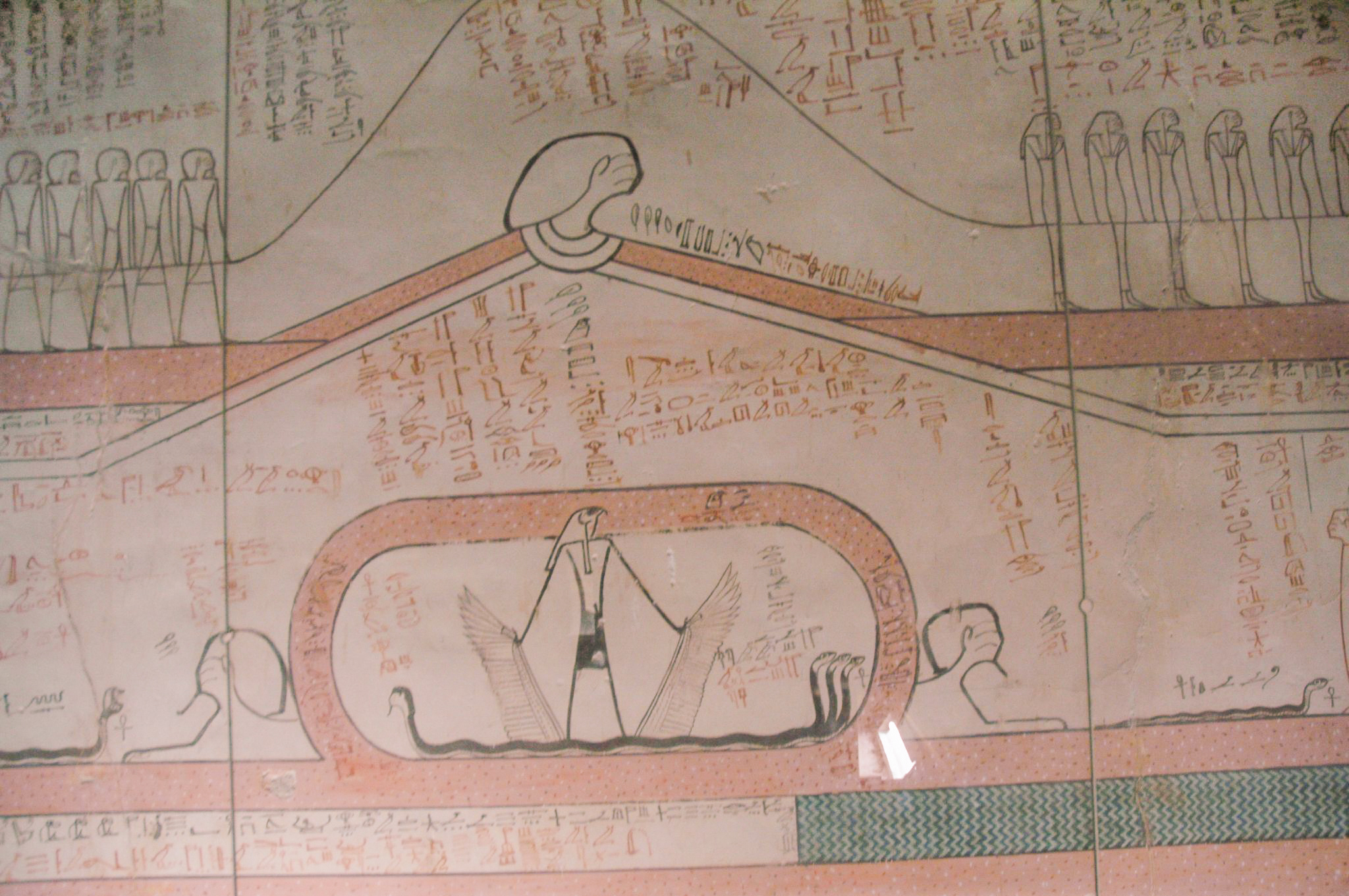 Valle dei Re: tomba di Thutmosi III